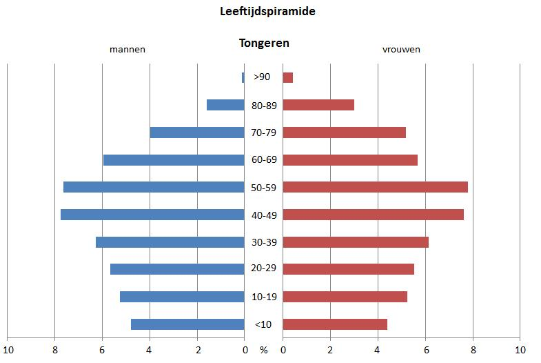 Leeftijdspiramide Tongeren